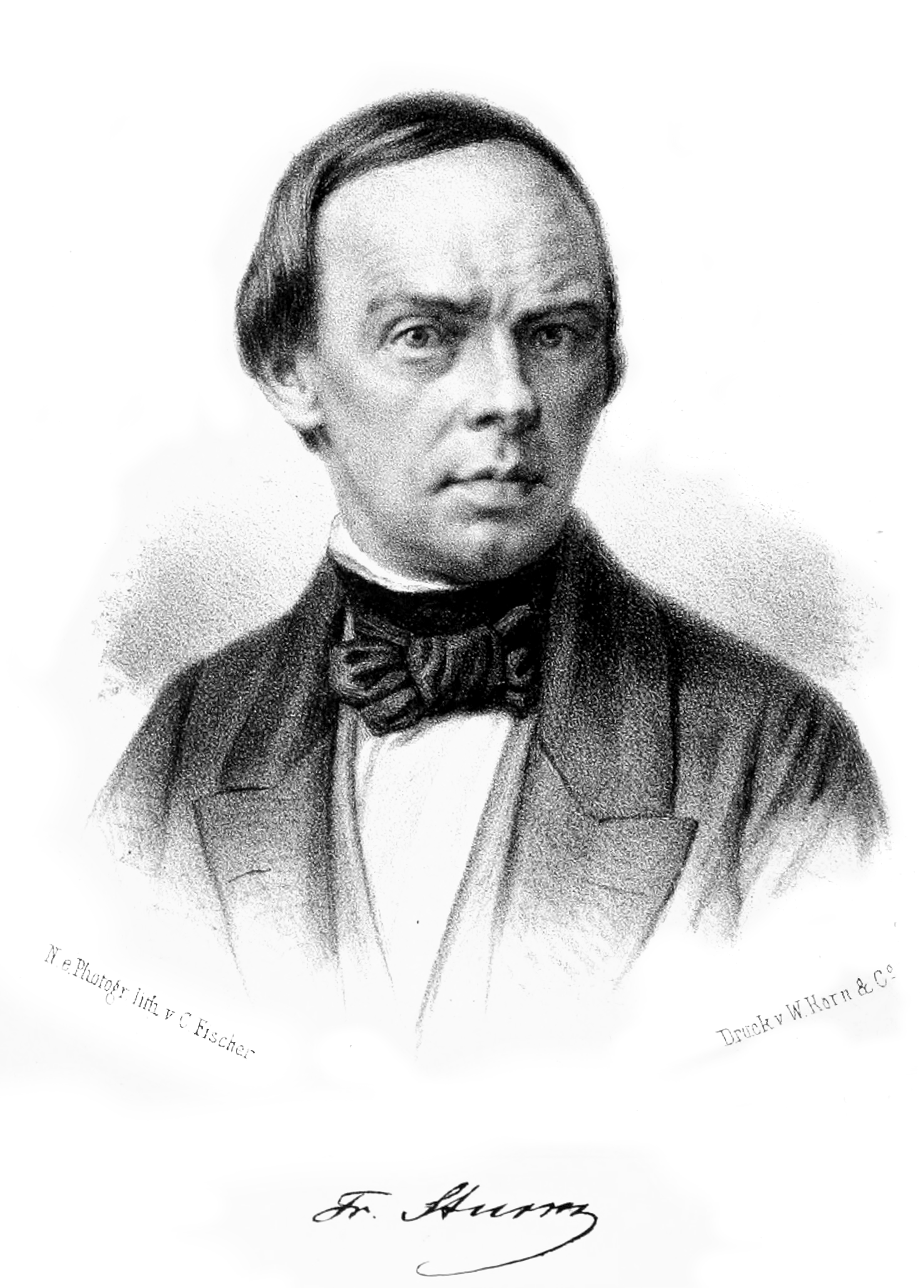 Porträt: Johann Heinrich Christian Friedrich Sturm. In: Berliner entomologische Zeitschrift. Herausgegeben von dem Entomologischen Vereine in Berlin. Nicolai (in Commission), Berlin 1862